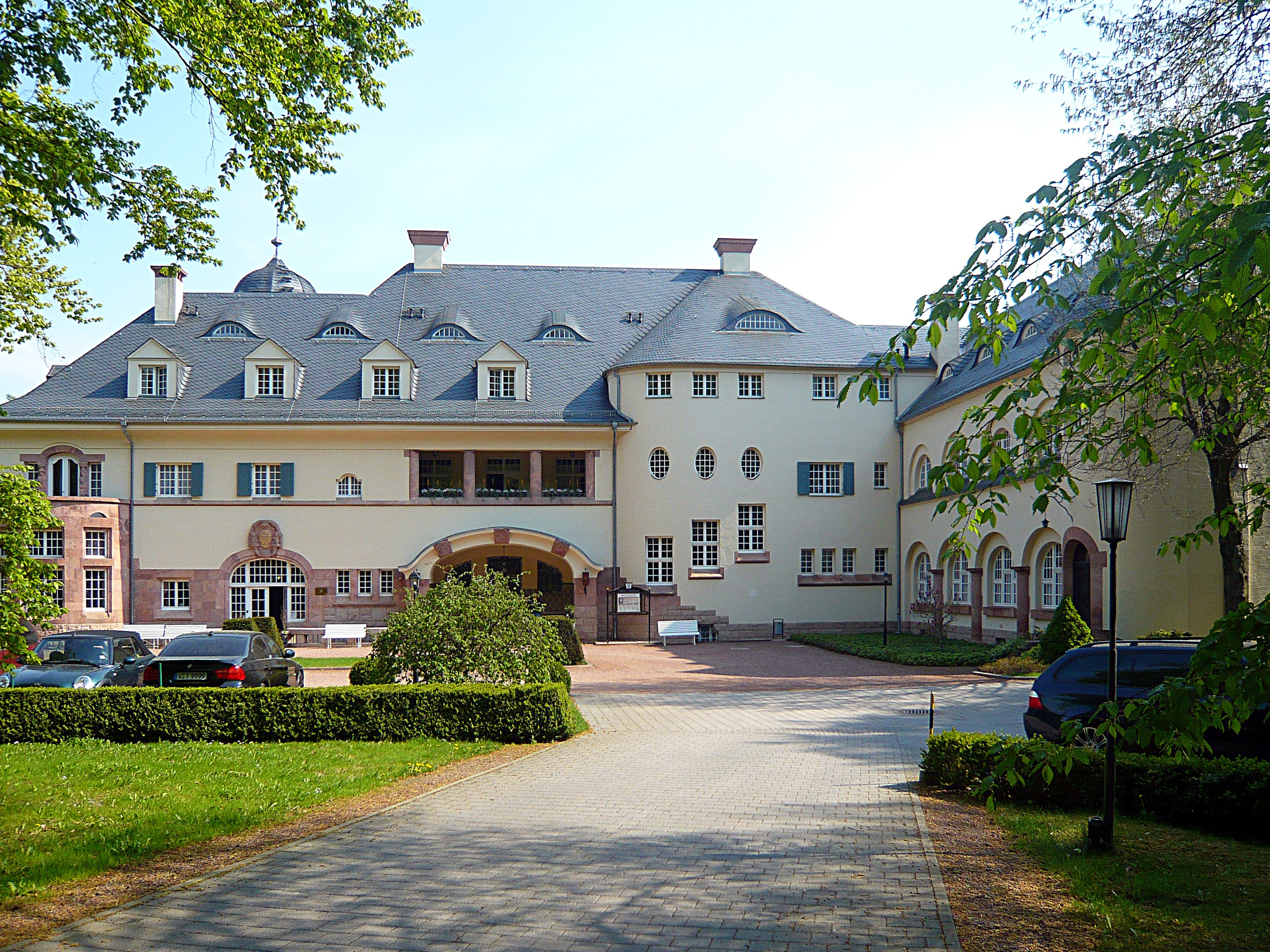 Schloss Wolfsbrunn, Hartenstein-Stein